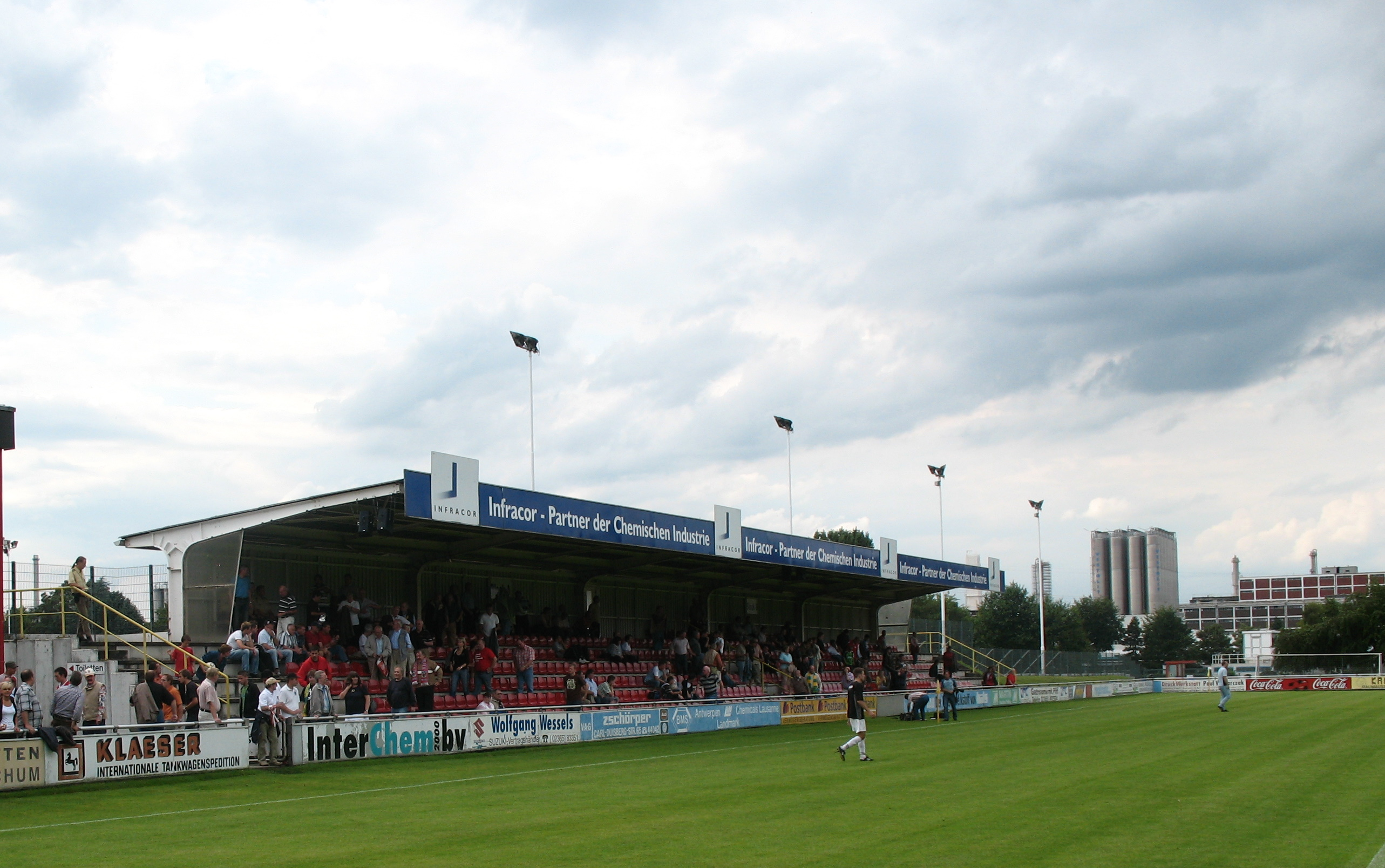 Haupttribüne des Stadions am Badeweiher des VfB Hüls